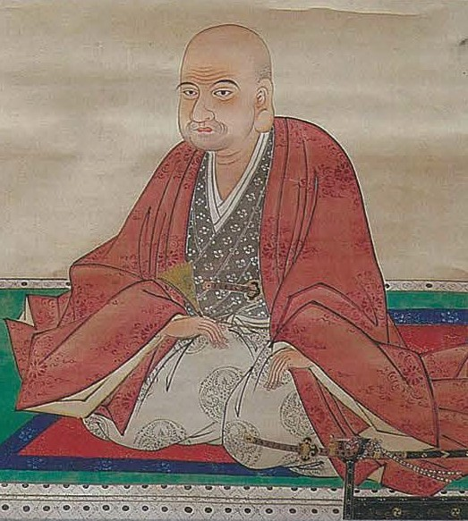 有馬則維の肖像。